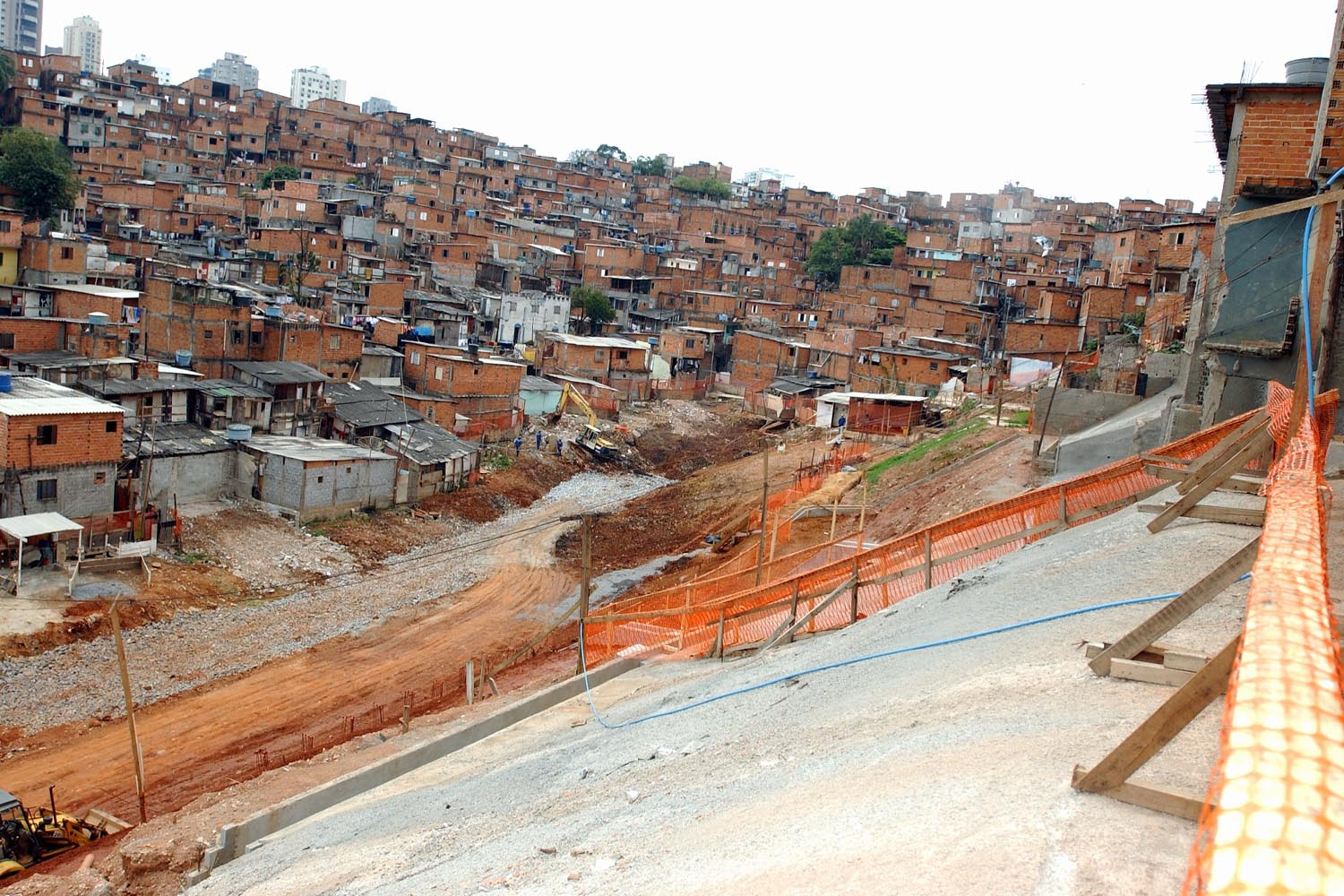 Imagem de SP